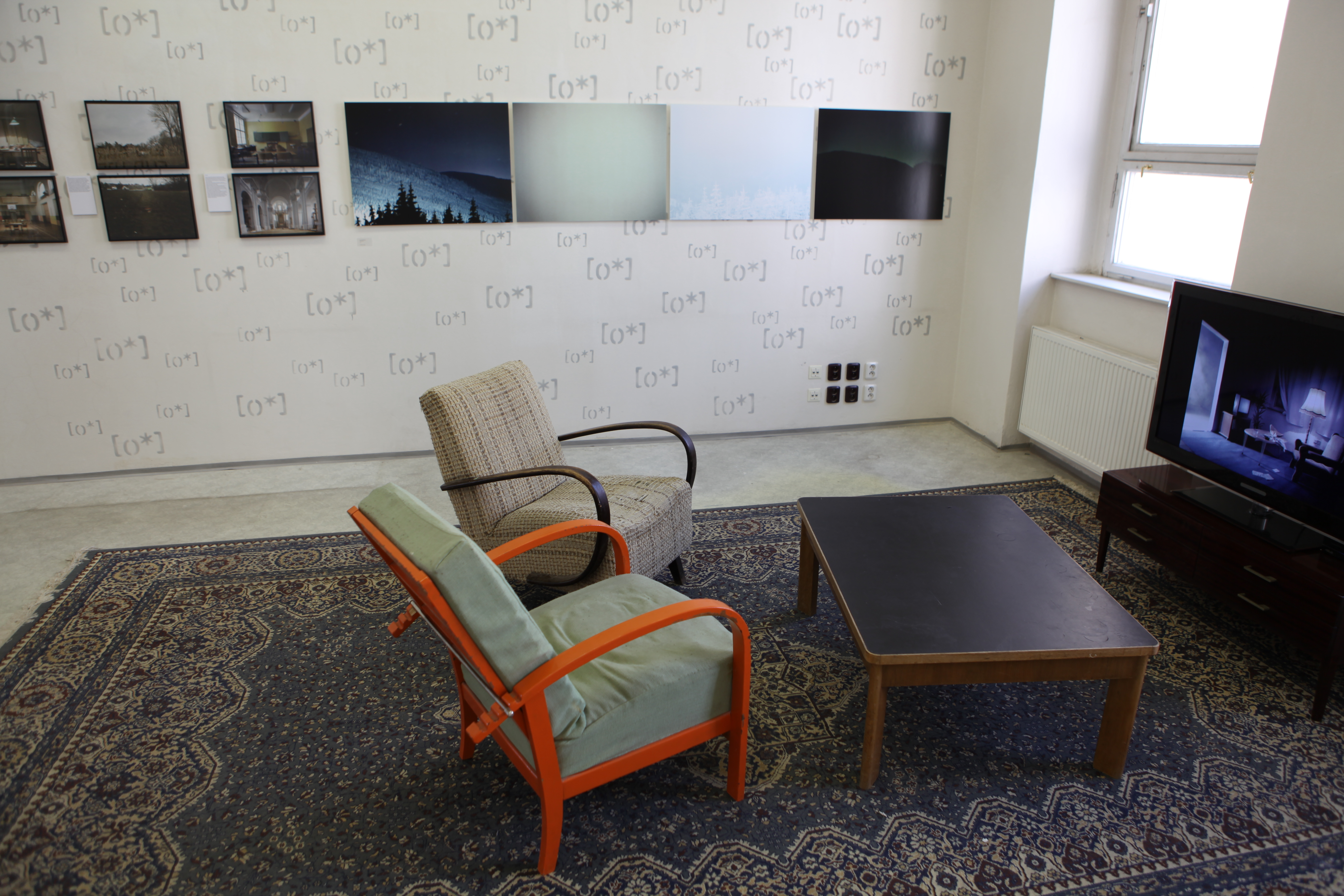 Expozice festivalu Prague Photo 2013, foto: Vít Švajcr Dobré světlo.com.